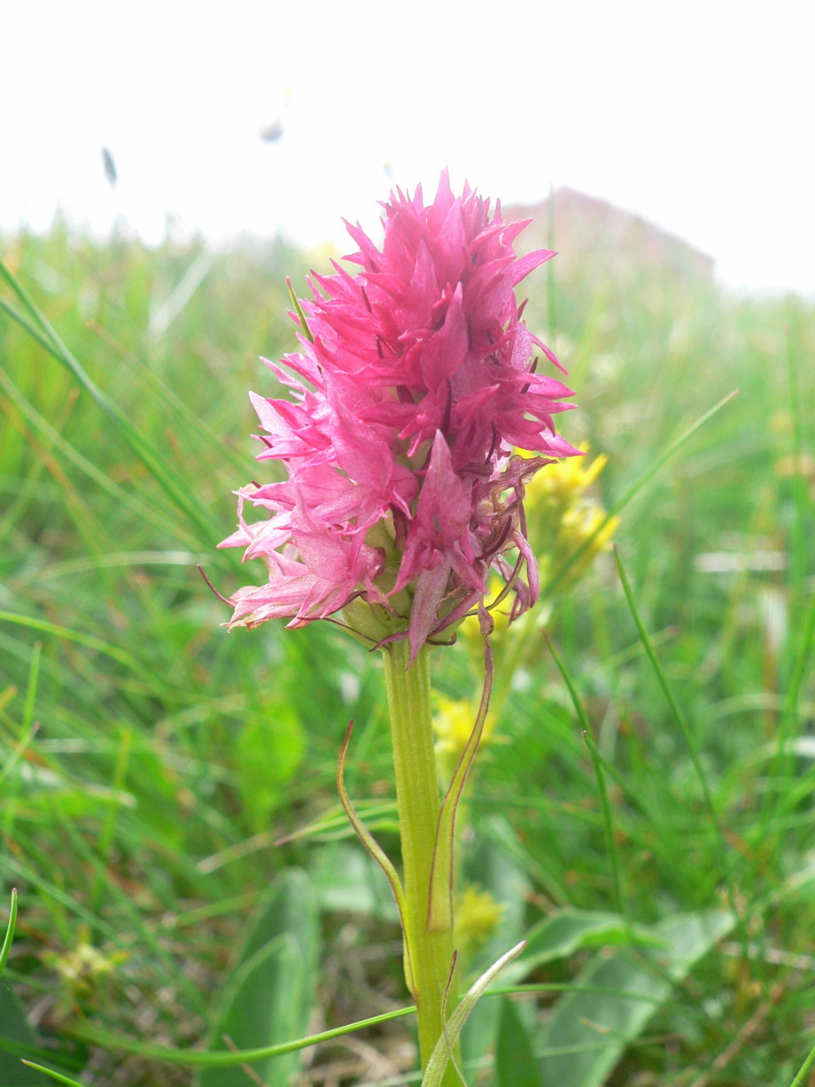 Foto scattata nei pressi del bivacco "Margherita Bedin" sul pianoro antistane la vetta sommitale delle Pale di San Lucano.